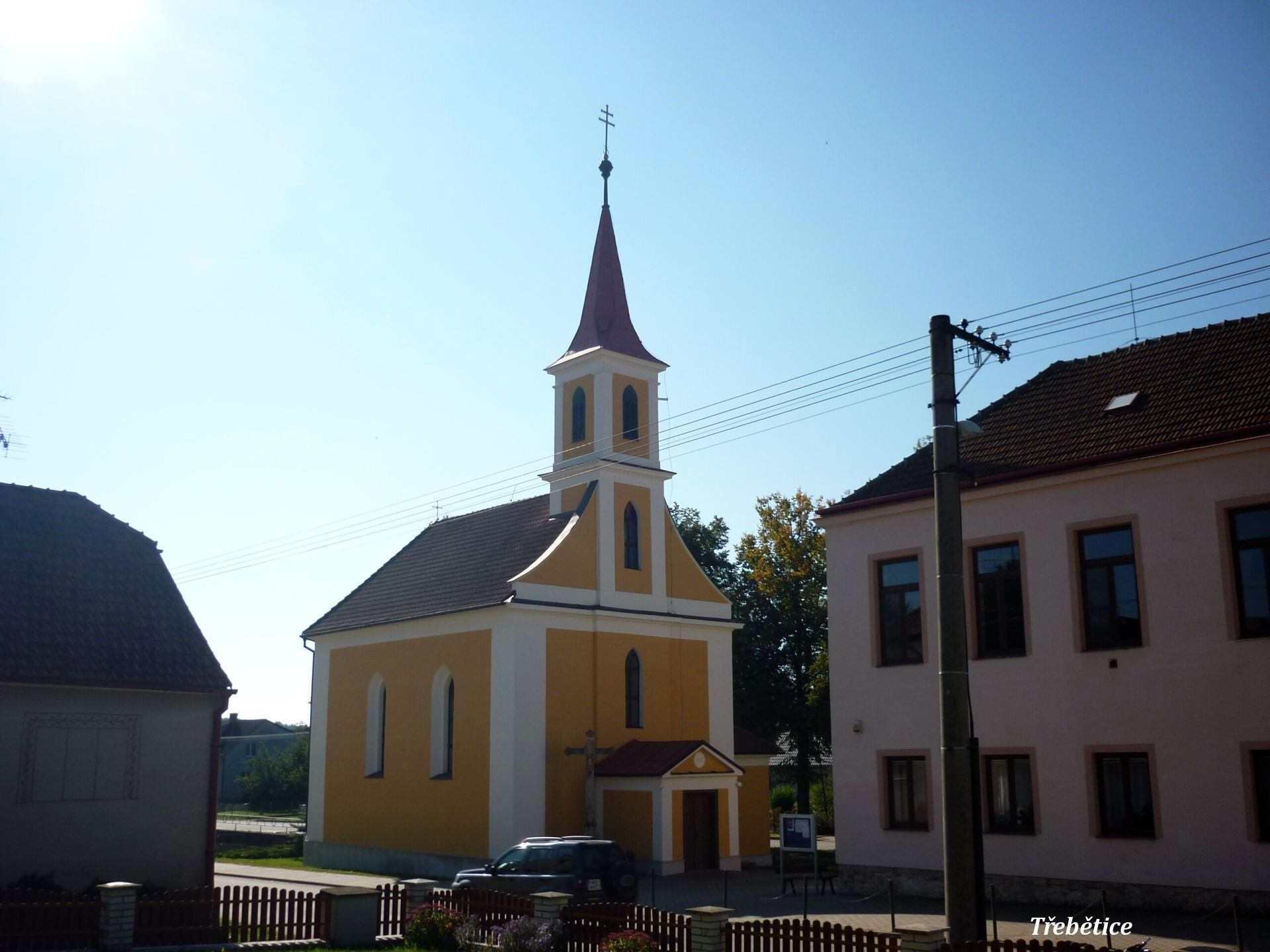 Kostel sv. Václava v Třeběticích